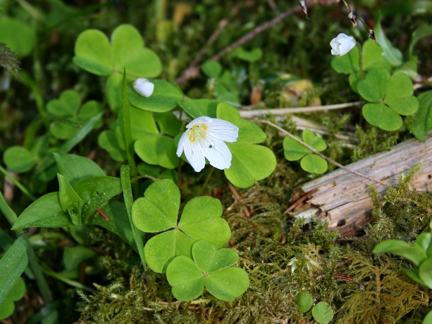 Wald-Sauerklee (Oxalis acetosella), Sauerkleegewächse (Oxalidaceae) – Österreich/Austria/Autriche: Tirol, Kitzbüheler Alpen, Jochbergwald ca. 2,5 km N Pass Thurn, ca. 1060 m